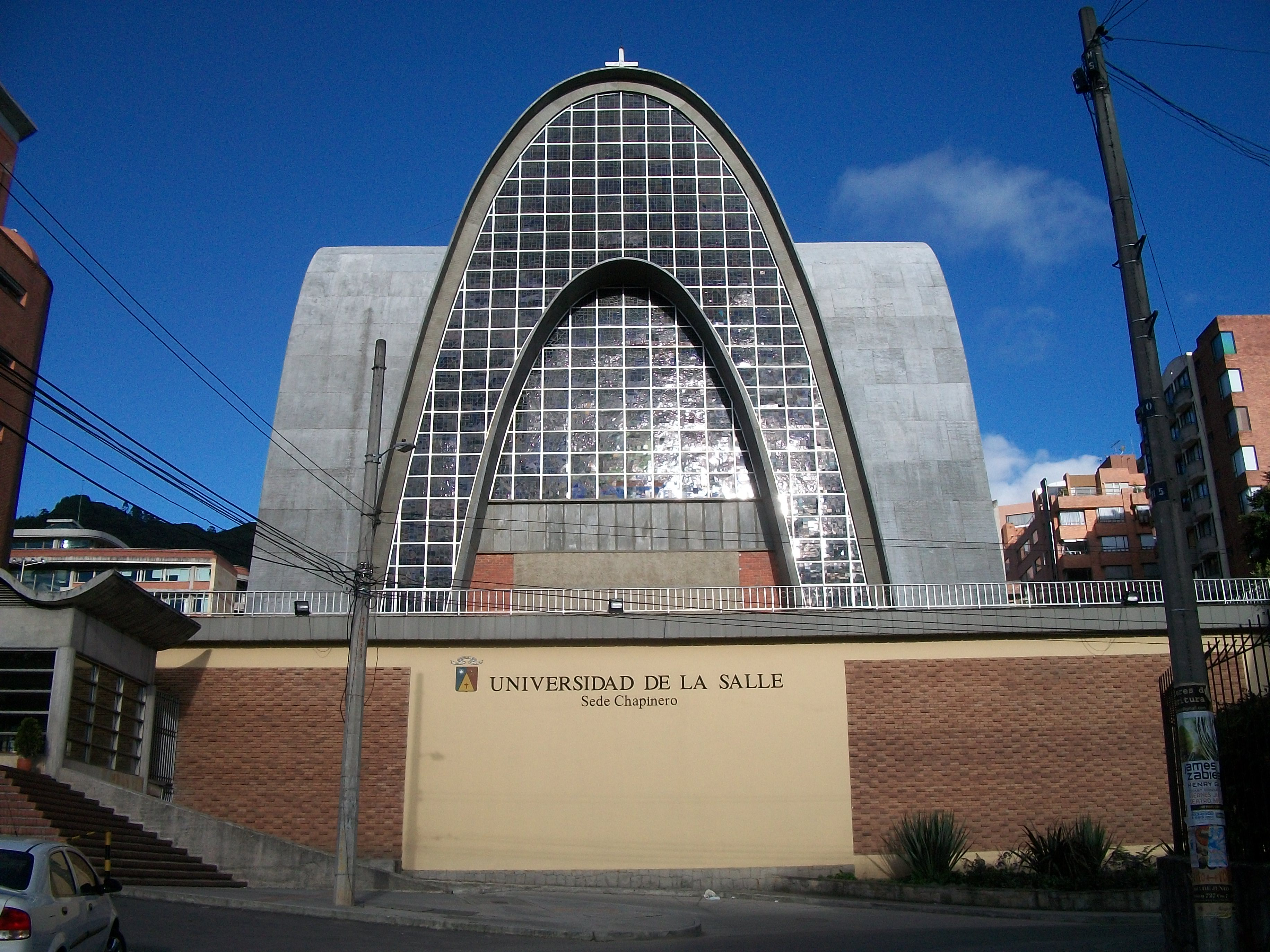 Iglesia de la Universidad de la Salle sede Chapinero, División de Formación Avanzada Cra 5 No 59A-44. Barrio La Salle de la localidad de Chapinero.